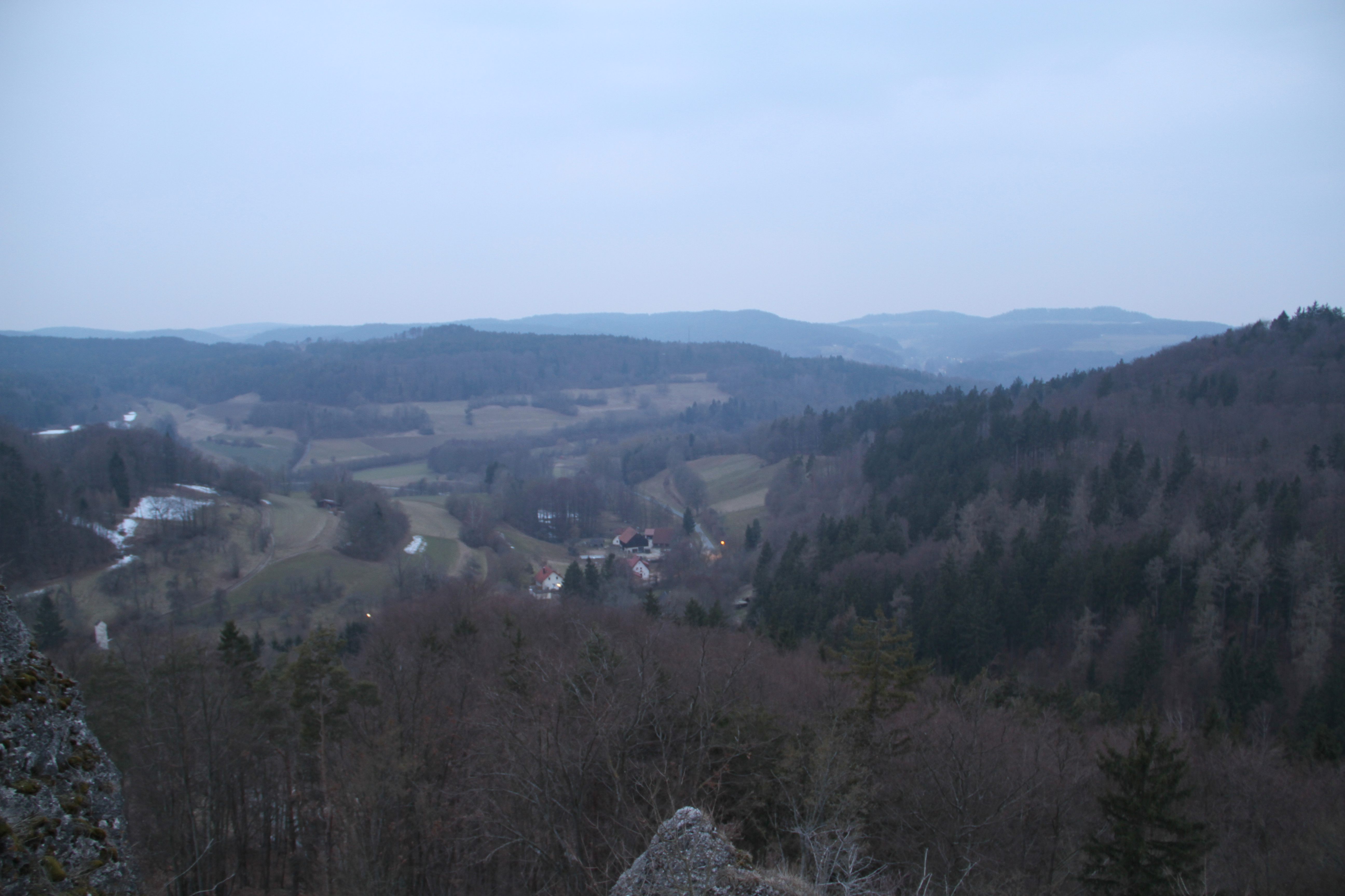 Blick vom Burgberg der Burg Niesten über die nordwestlichen vorgelagerten Häuser der Ortschaft Niesten in den sog. Weismaintaltrichter In der rechten Hälfte sind am Horizont die beiden Gipfel des Kordigasts zu sehen